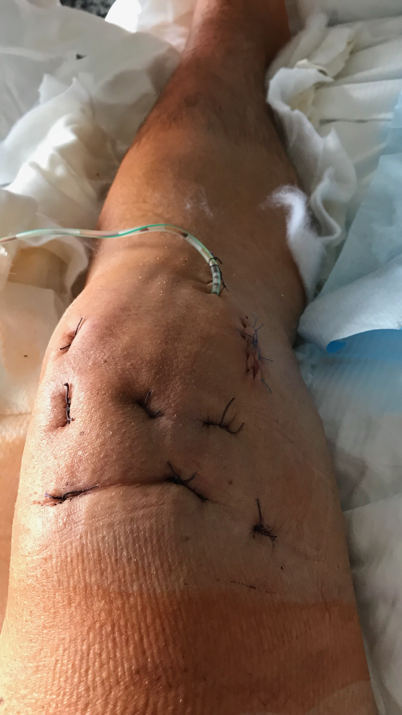 Decollementverletzung nach Operation vernäht mit Steppnähten und Drainageschlauch